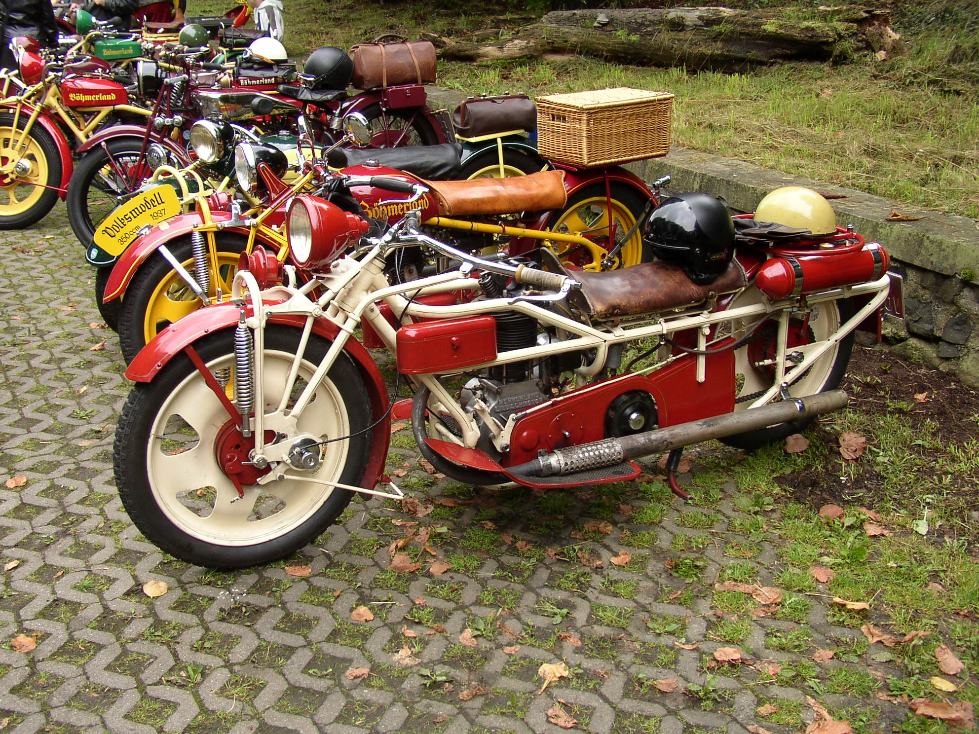 Motocykly Böhmerland, sraz Jiřetín pod Jedlovou, Czech Republic